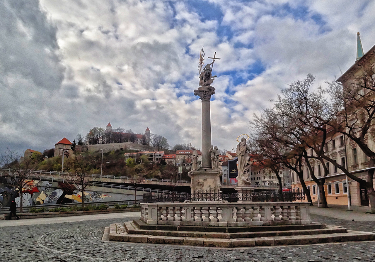 Братислава Март 2014